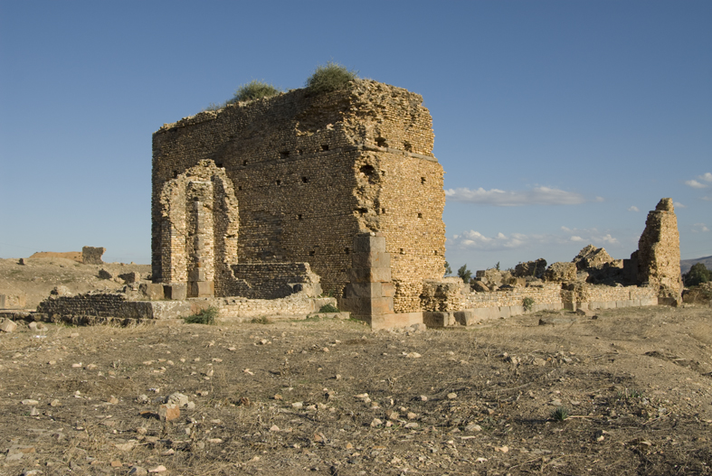 Römische Basilika in Chimtou, Tunesien